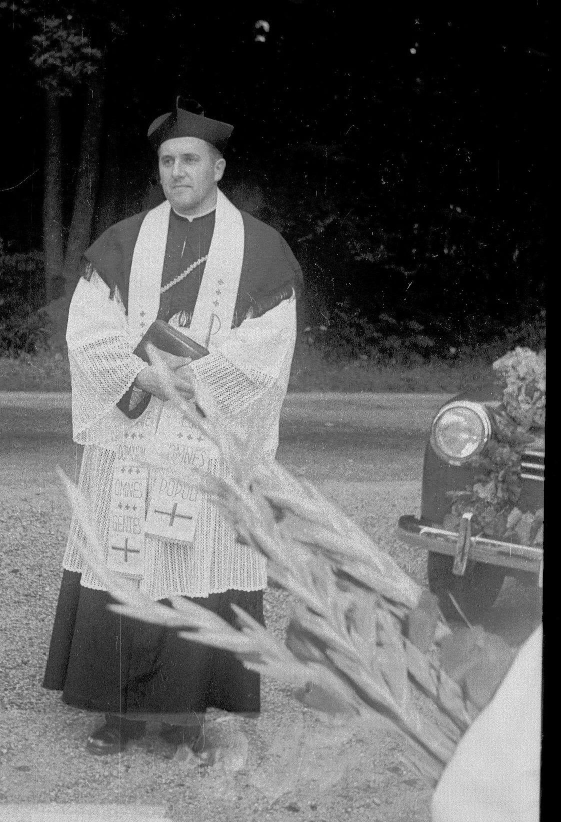 Pater Ferdinand Raba beim Empfang